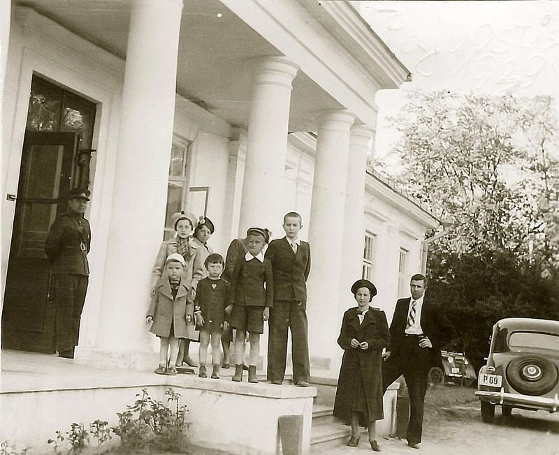 Pajuosčio dvare (iš dešinės: Vladas, Kazė, Rimgaudas, Vytis Vaitkai). 1939 metai